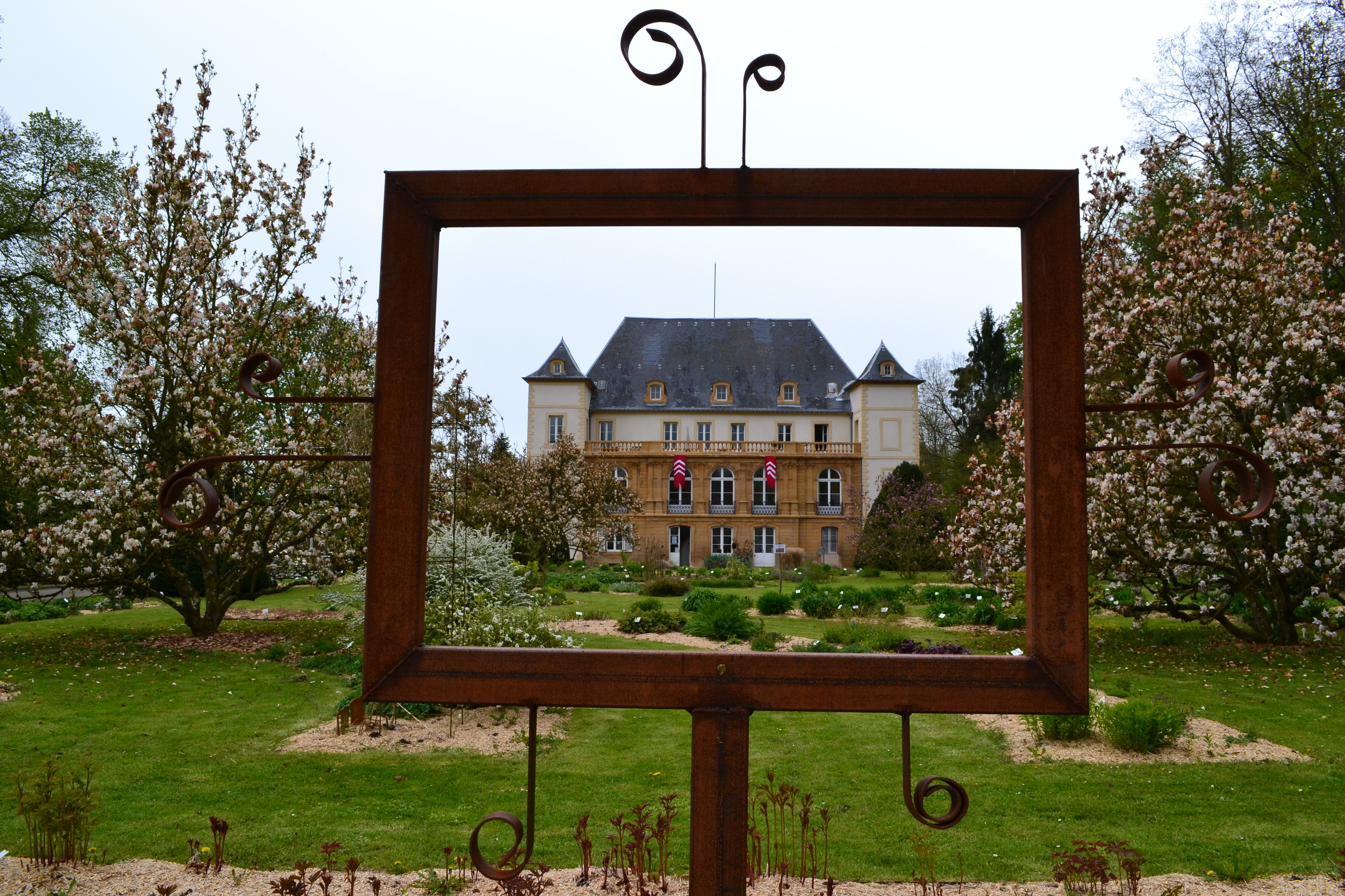 ouvre d'art des classe de l'établissement